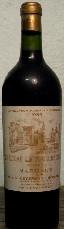 Château La Tour de Mons 1959 bottle